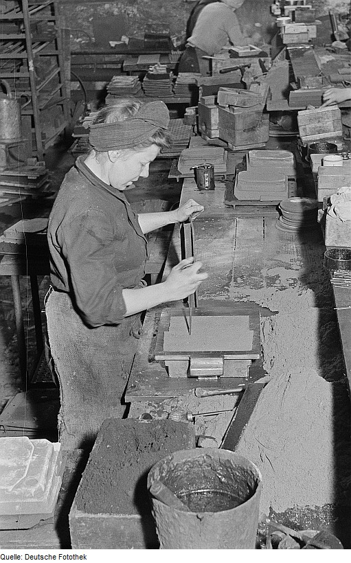 Original image description from the Deutsche Fotothek Kernmacherin bei der Arbeit